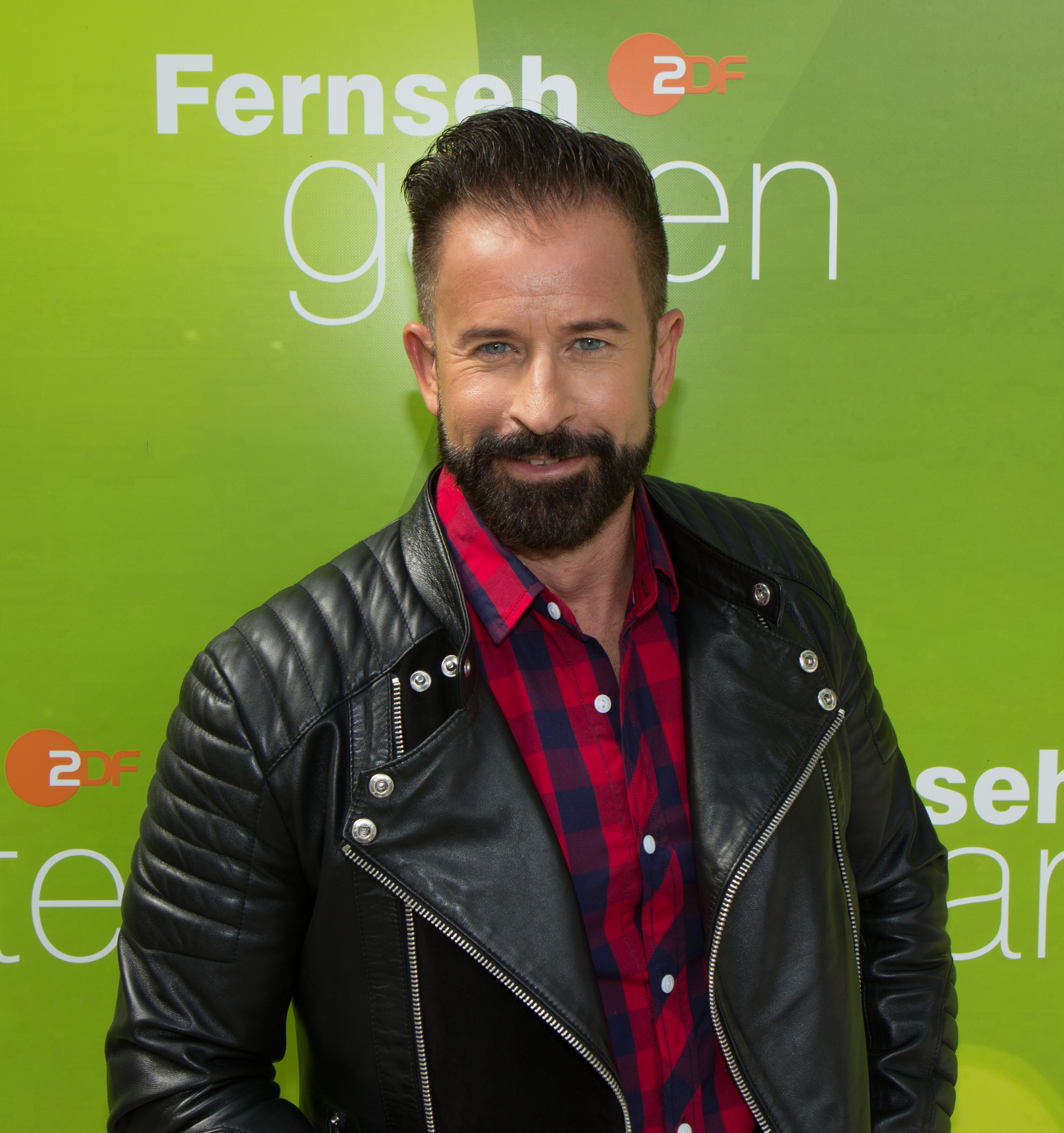 Leonard als Gast im ZDF-Fernsehgarten am 9. September 2018 in Mainz.